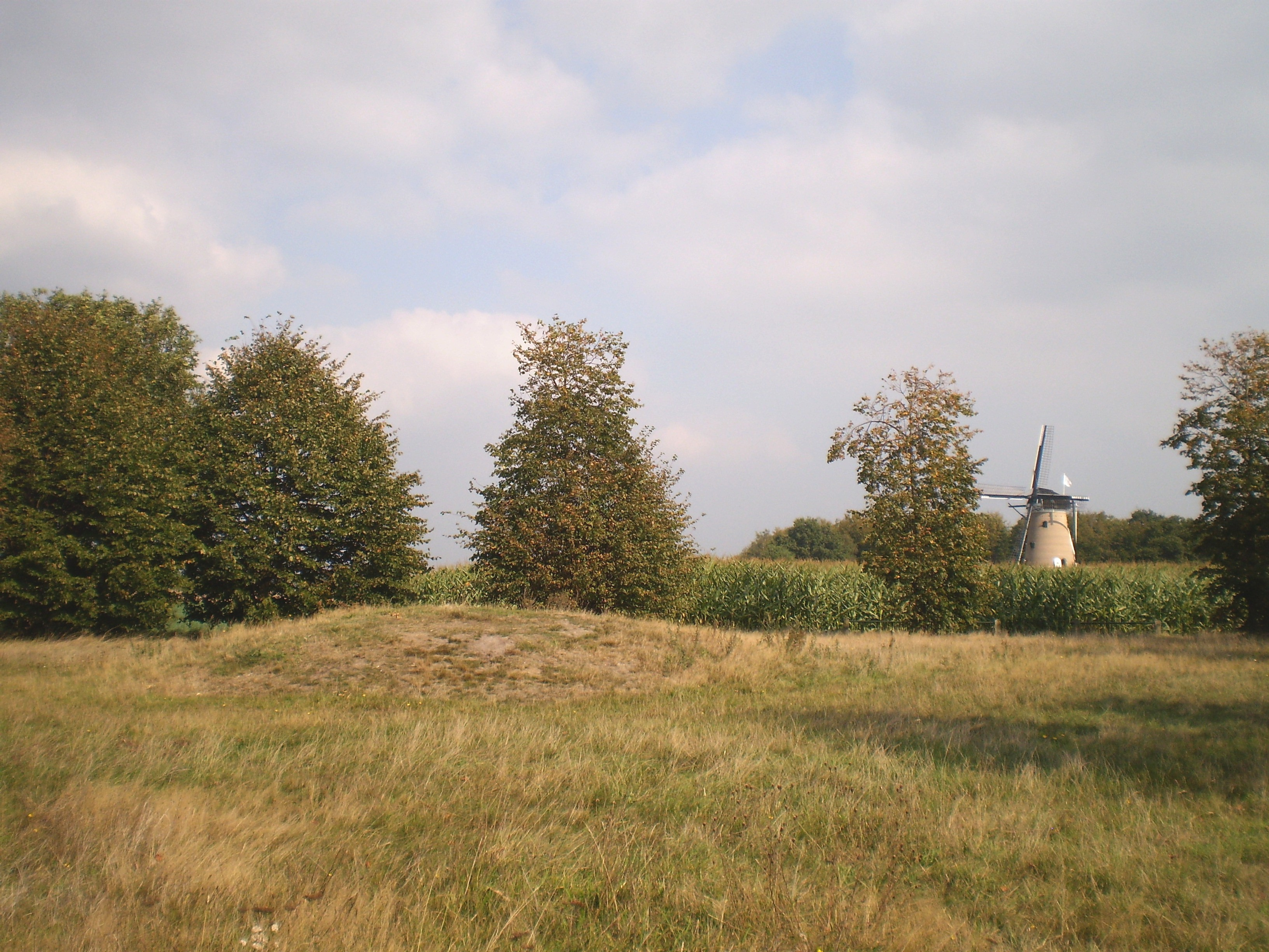 == Lisinsje: ==